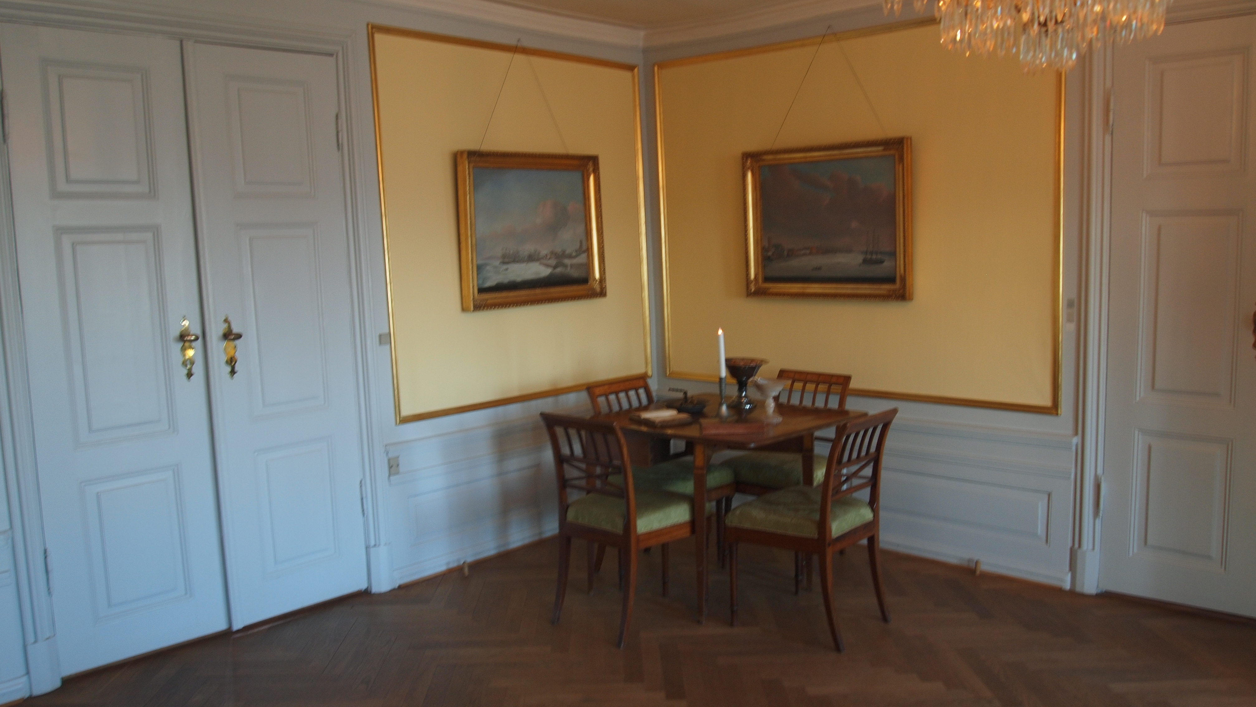 En del af interiøret på 1. sal i Skibsklarergaarden.